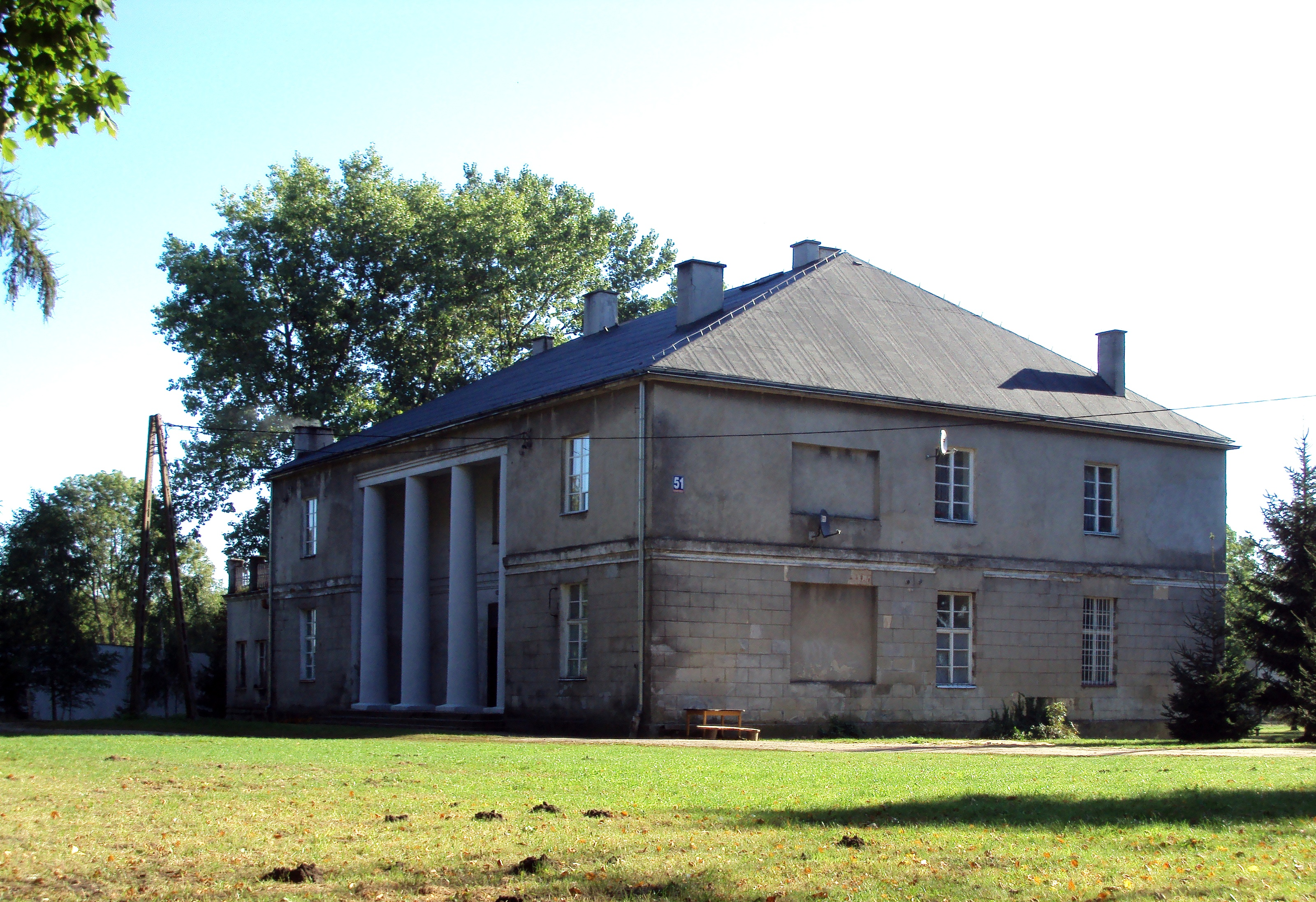 zespół pałacowy: pałac, XVIII/XIX Sadłowo